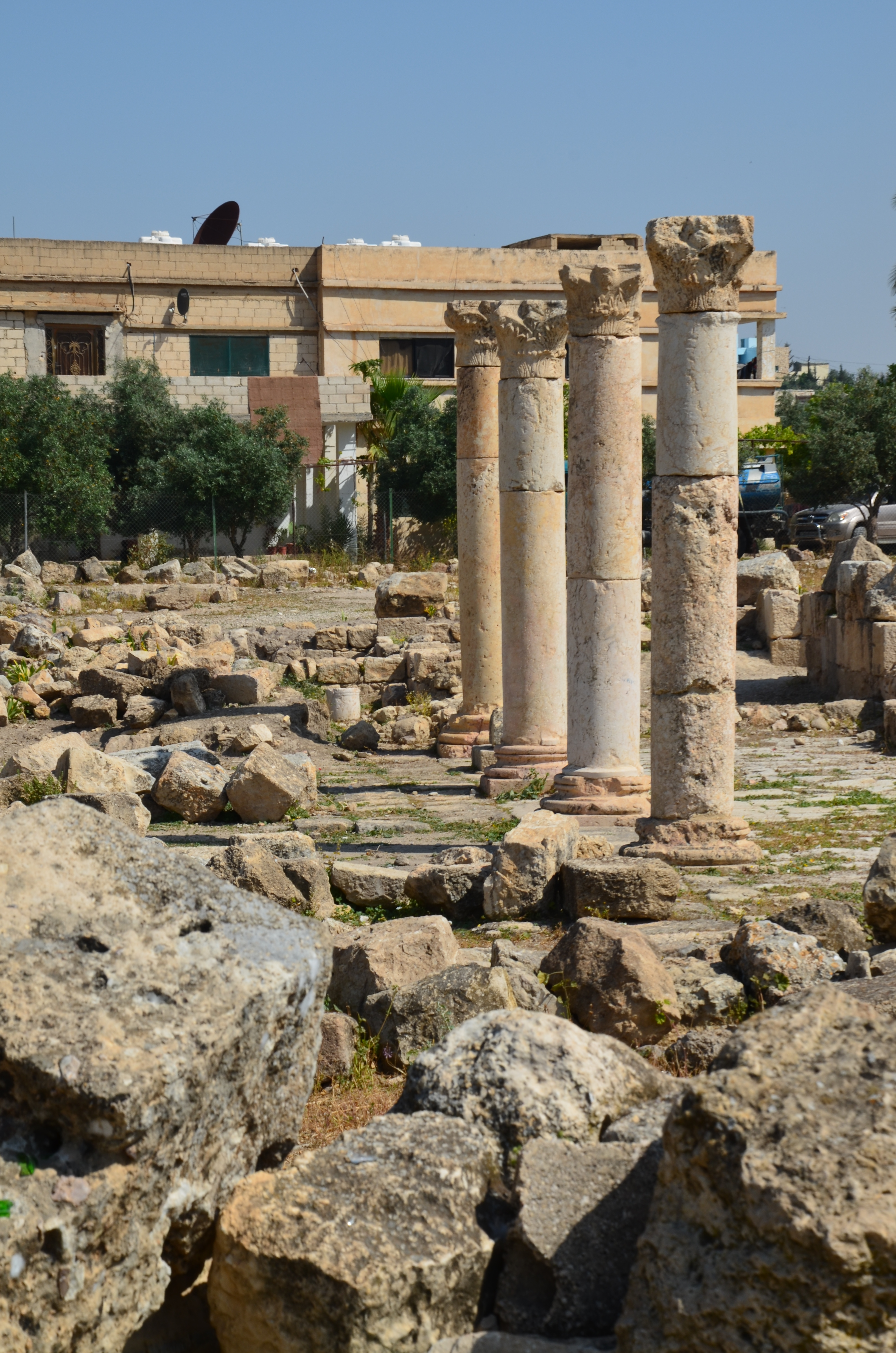 Pella, Jordan